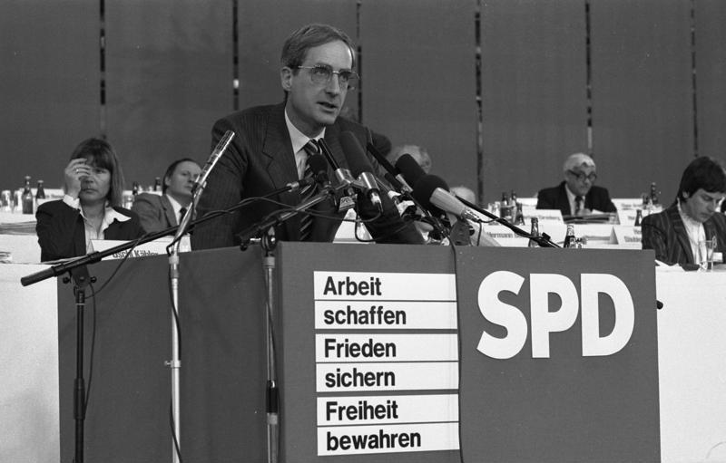 SPD-Parteitag in der Olympiahalle in München